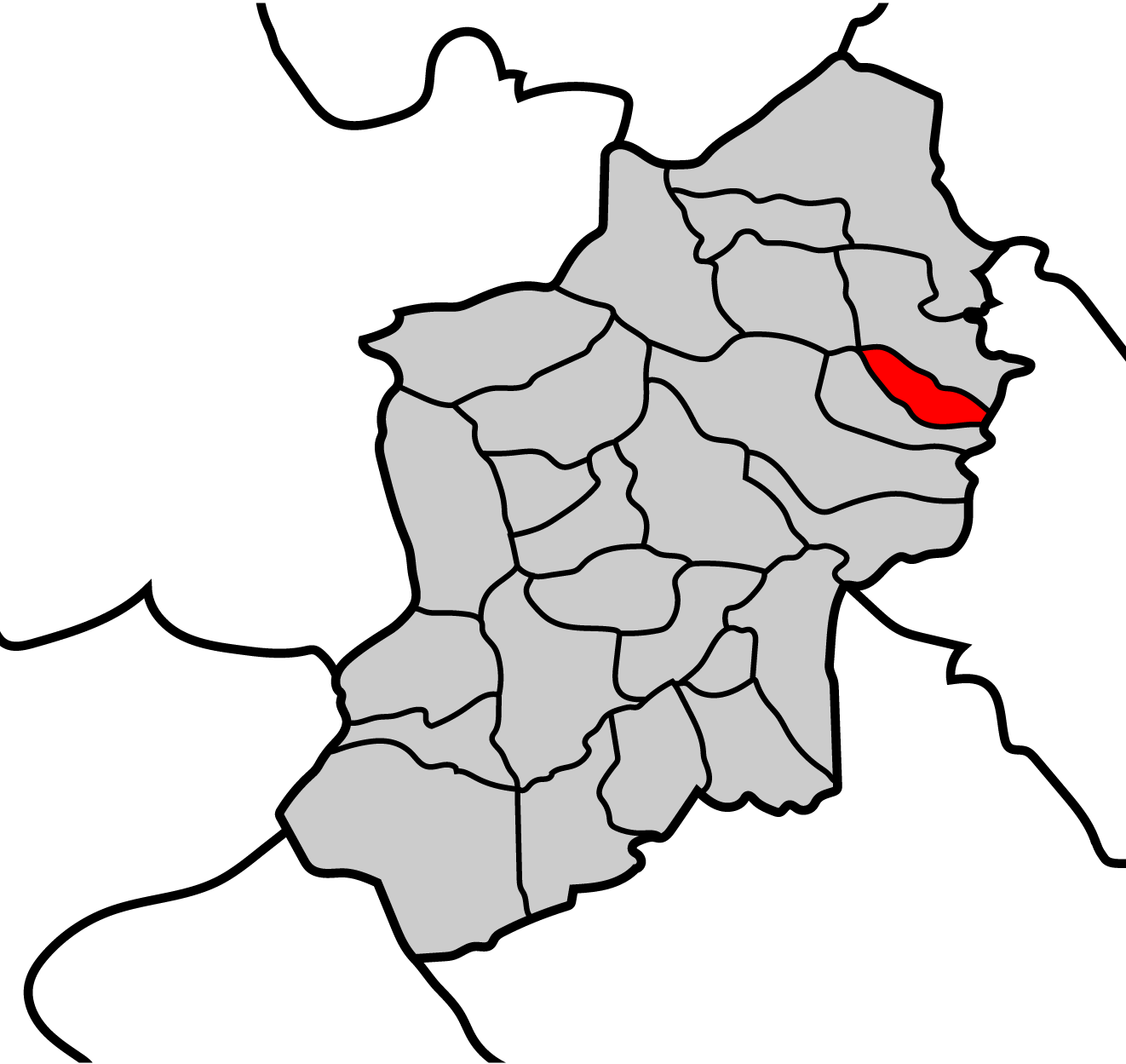 Mapa de la parroquia de Pando ayuntamiento de Becerreá